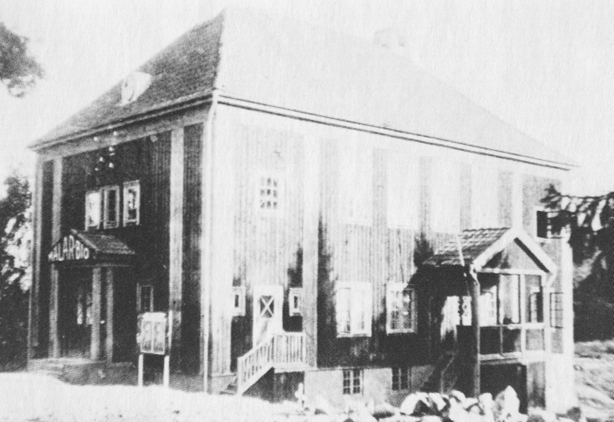 Biografen "Mälarbio"